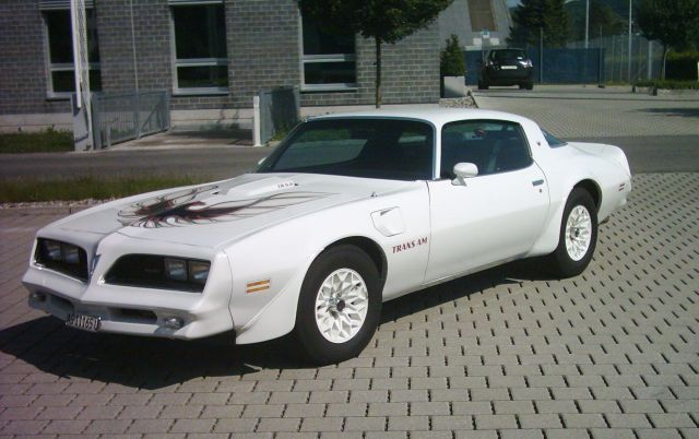 Pontiac Trans AM 1977 6.6L Automat